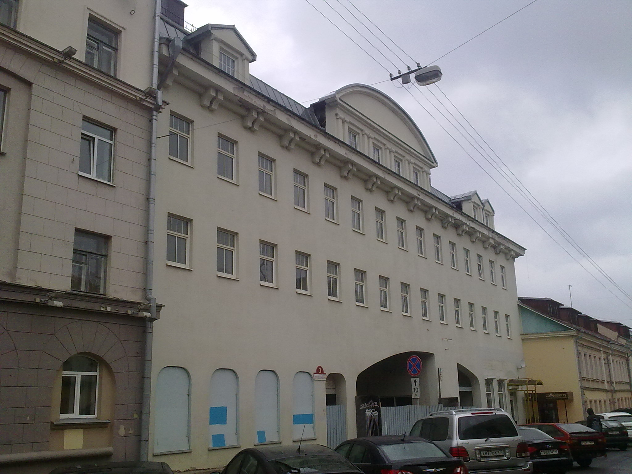 Мінск. Вуліца Інтэрнацыянальная. 2012